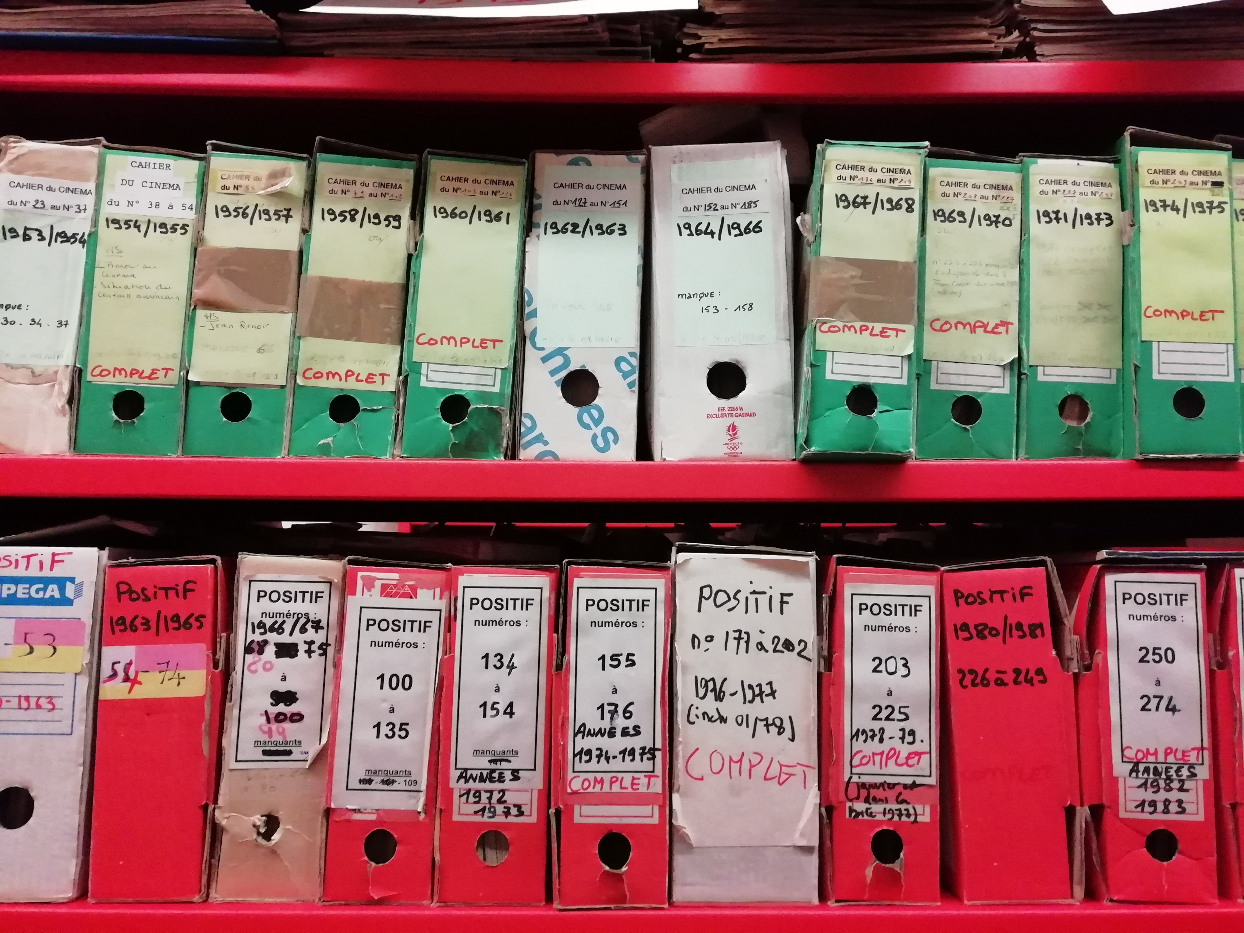 collection des revues "Positif" et "Cahiers du cinéma", archive de la cinémathèque de Grenoble